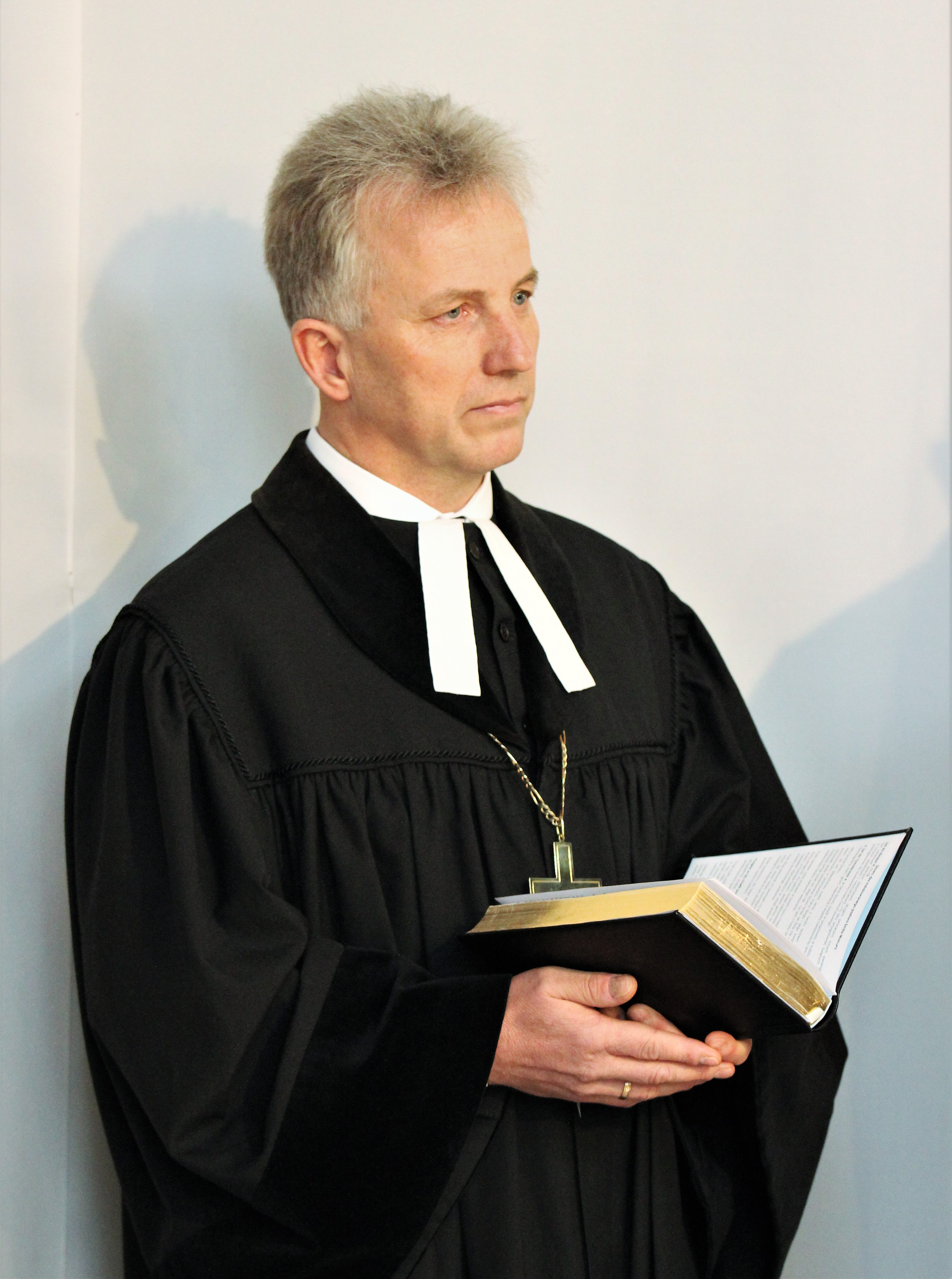 Tomáš Tyrlík, biskup SCEAV. Fotografováno 4.3.2018 u příležitosti instalace Mgr. Emila Macury do úřadu sborového pastora FS SCEAV v Karviné